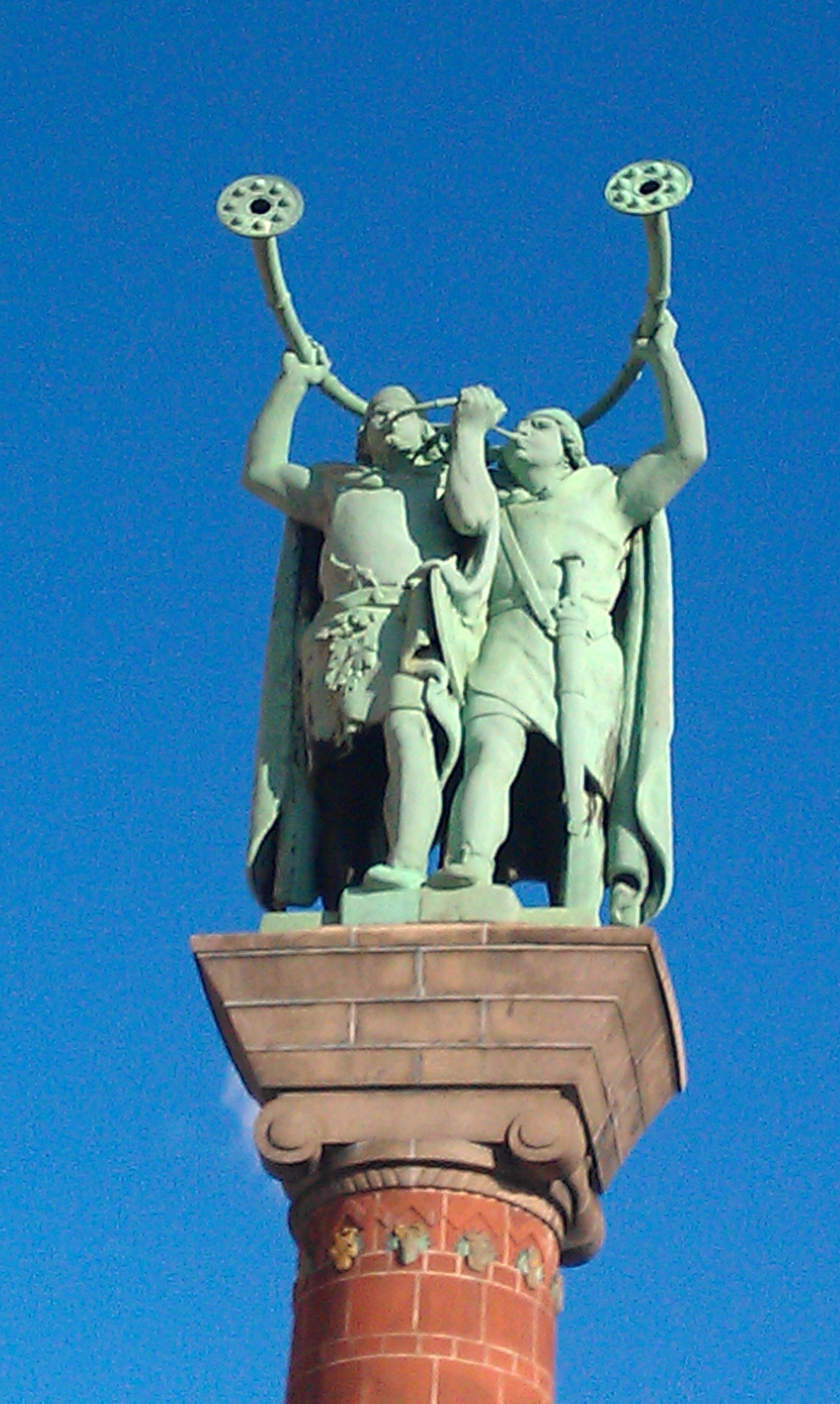 En statue som står plassert ved Rådhusplassen i København. Fra 1914.